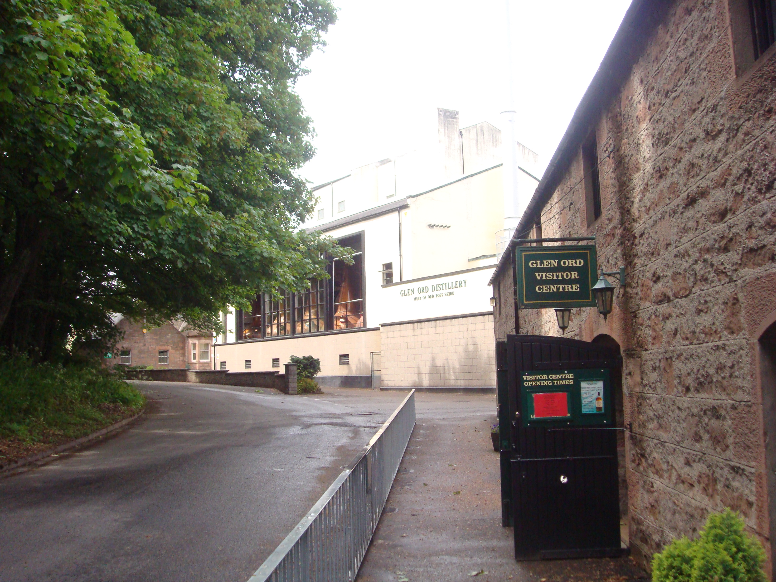 Glen Ord Distillery 2